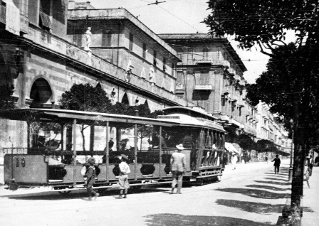 La Spezia Tram